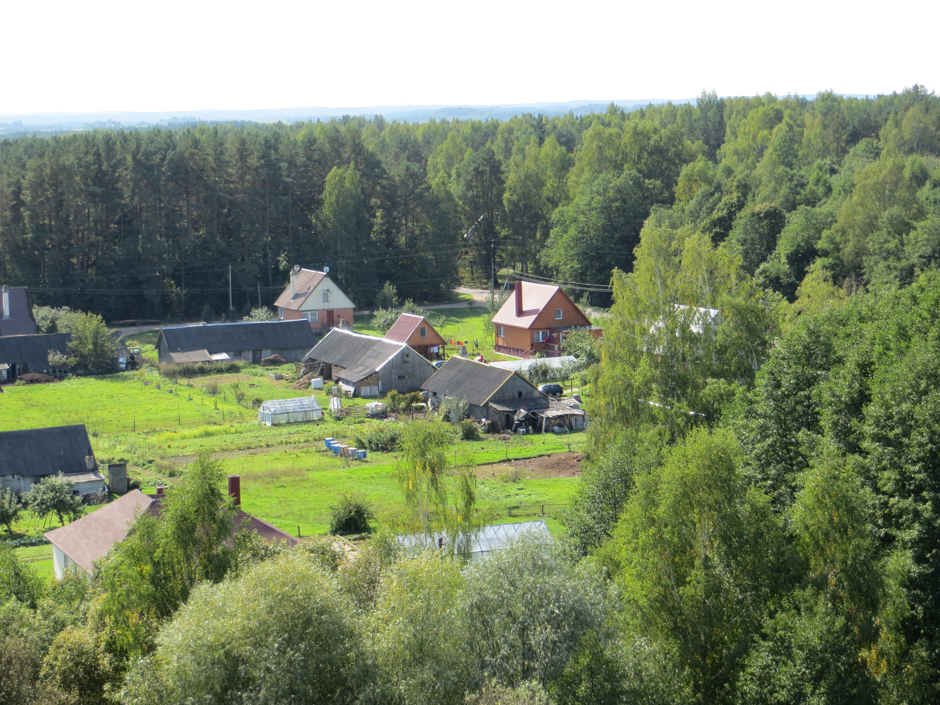 Mažėnai 30283, Lithuania